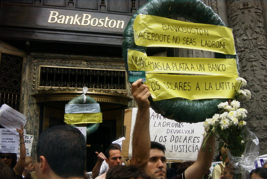 Manifestación de ahorristas argentinos contra el Corralito financiero frente a la sede central de BankBoston (Florida y Diagonal Norte). Buenos Aires, Argentina.